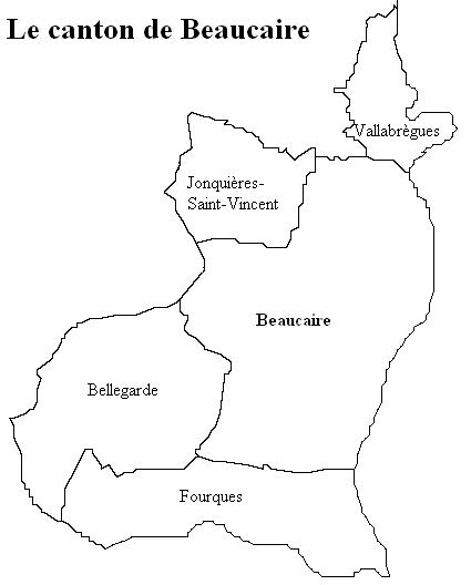 Le canton de Beaucaire Image personnelle